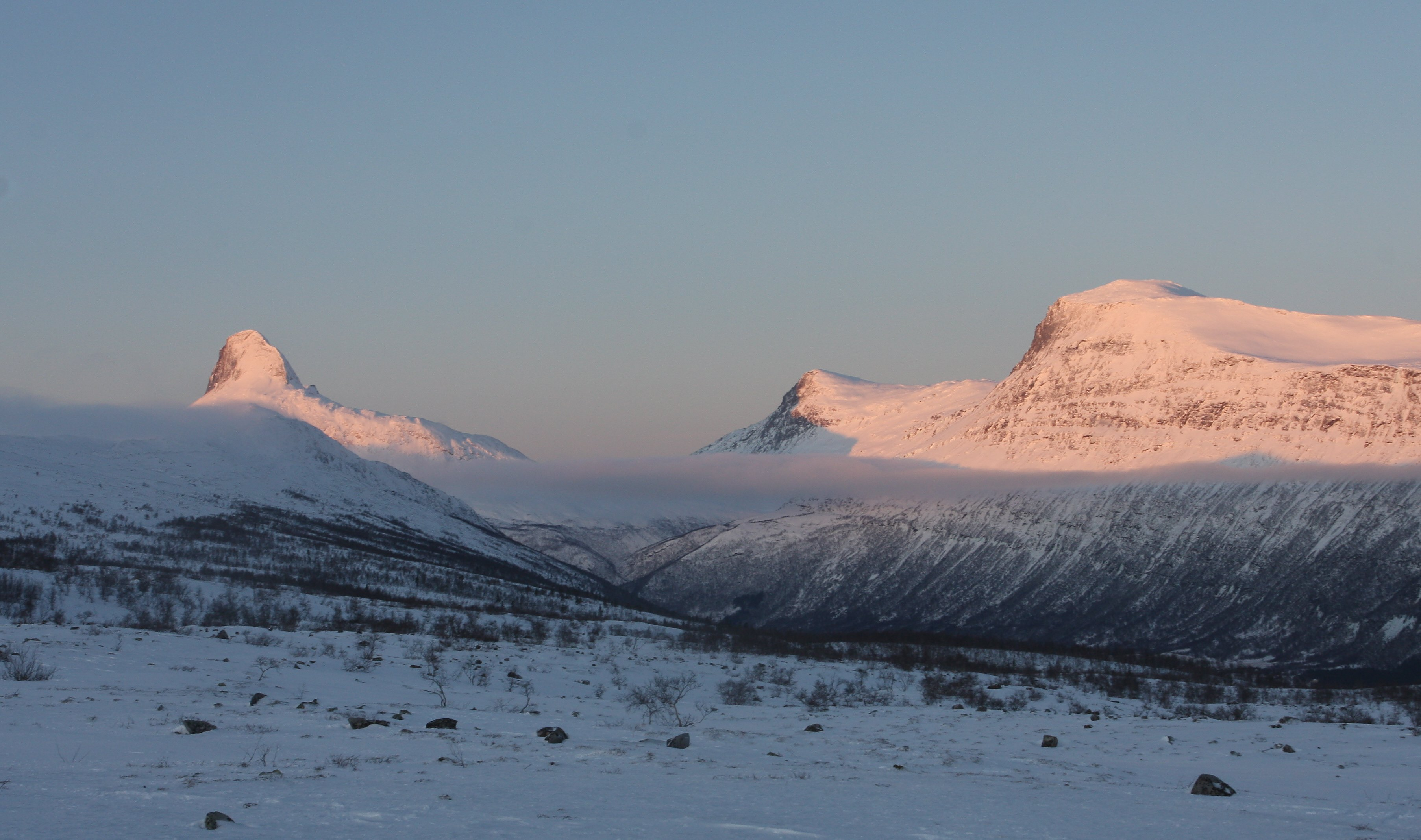 Junkerdalen in Saltdal with the first snow in September.